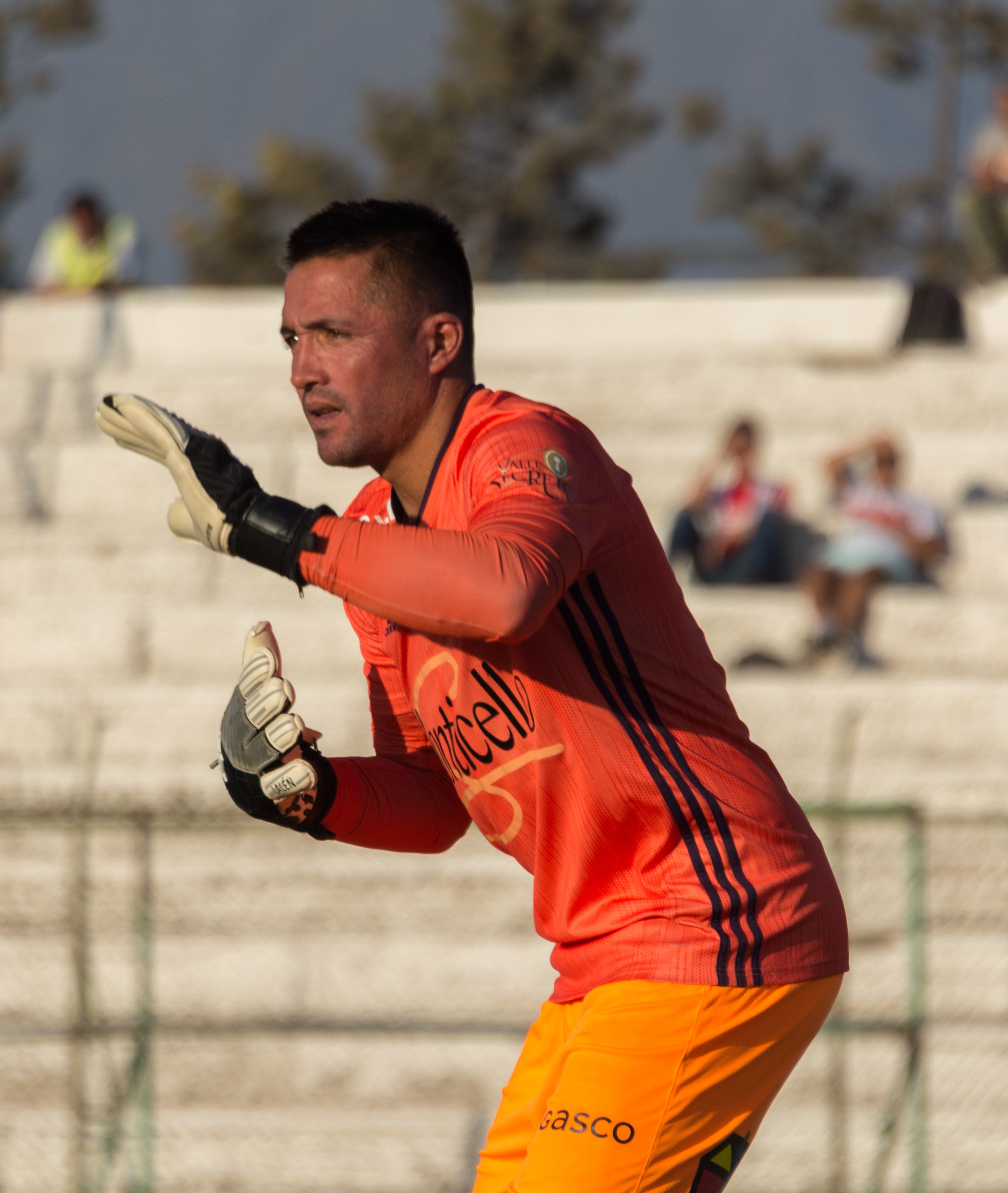 Miguel Pinto, Palestino v O'Higgins, Estadio Municipal de La Cisterna, La Cisterna, Santiago, Chile.